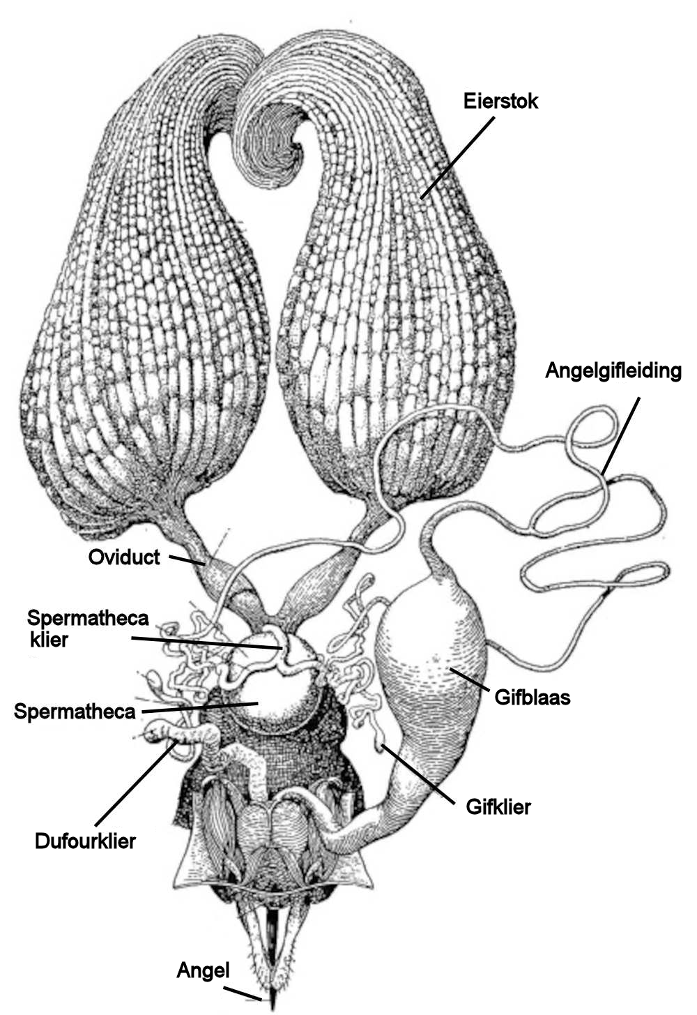 Geslachtsorganen en angel van koningin